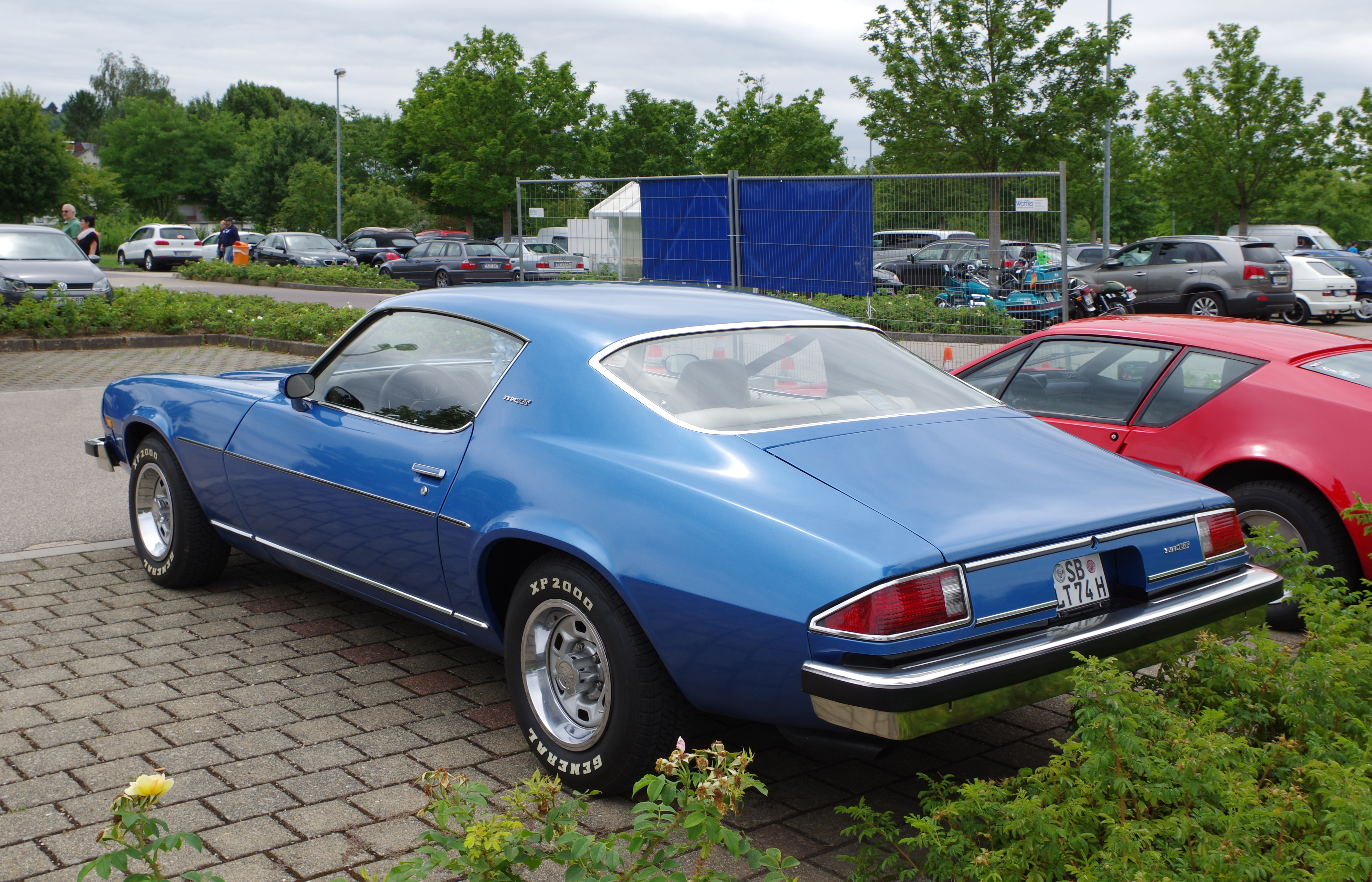 Chevrolet Camaro, 1974